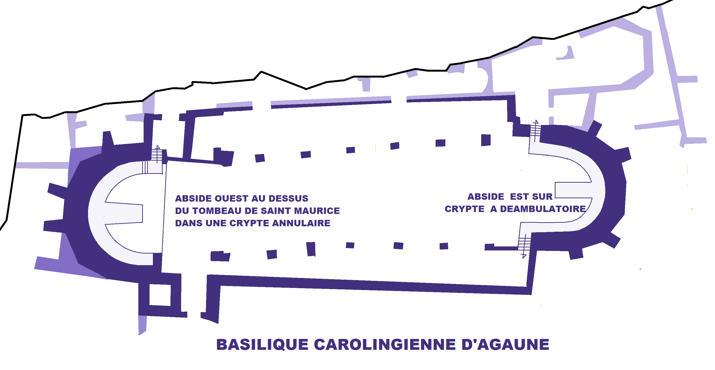 Agaune, plan de la basilique carolingienne